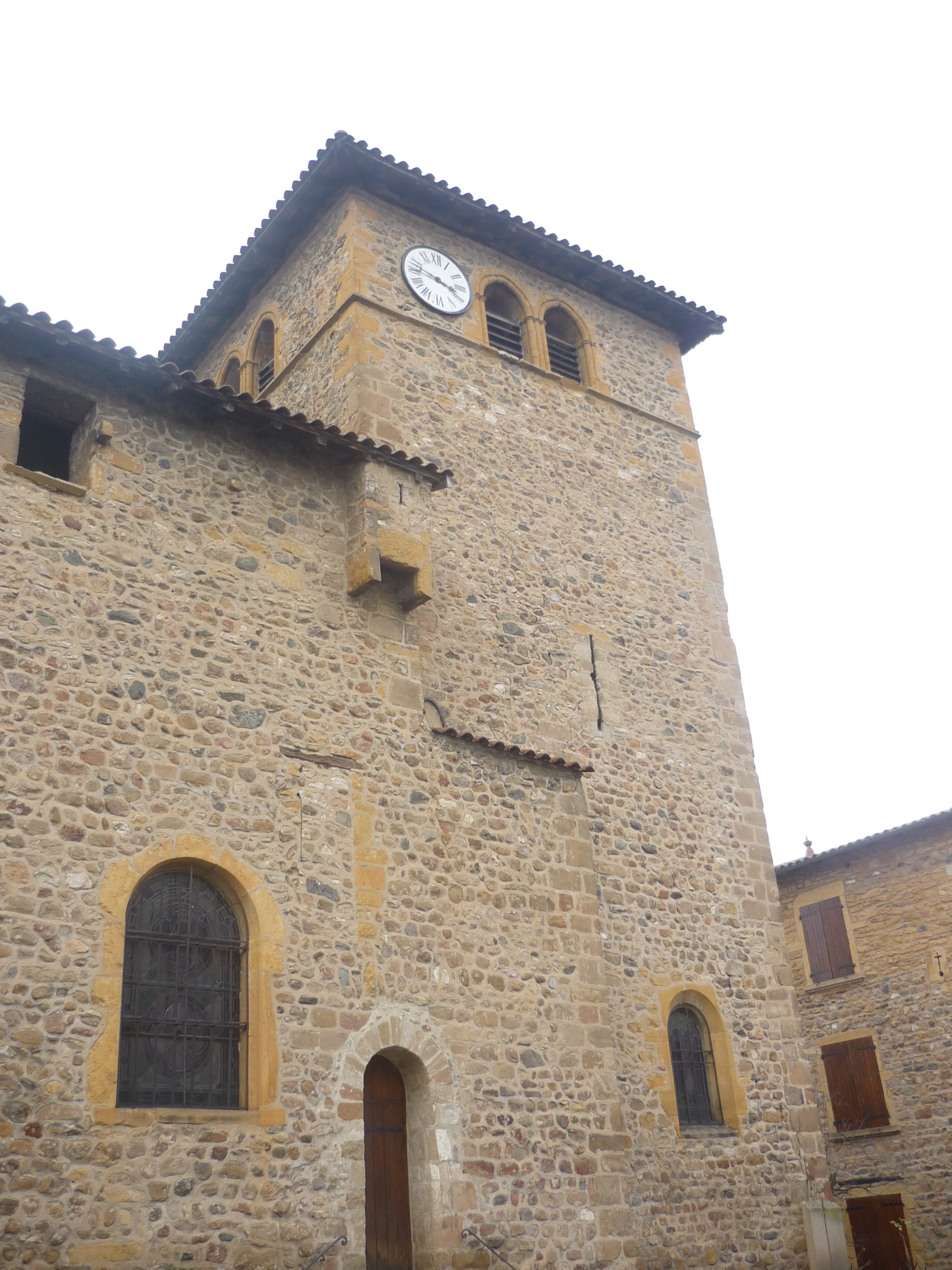 Église du Breuil dans le département du Rhône.